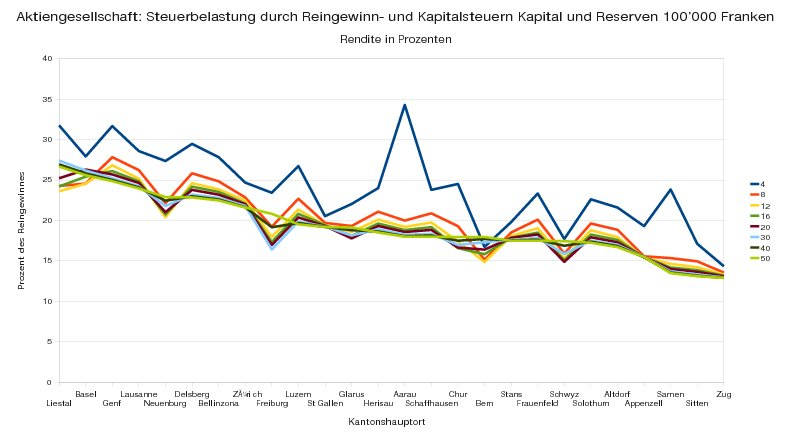 Steuerwettbewerb in der Schweiz: Aktiengesellschaft Kapital und Reserven 100K Franken - Reingewinn- und Kapitalbelastung durch Kantons-, Gemeinde- und Kirchensteuern sowie direkte Bundessteuer insgesamt in Prozenten des Reingewinnes 2007 Quelle: Steuerbelastung in der Schweiz, Kantonshauptorte und Kantonsziffern 2007, ESTV